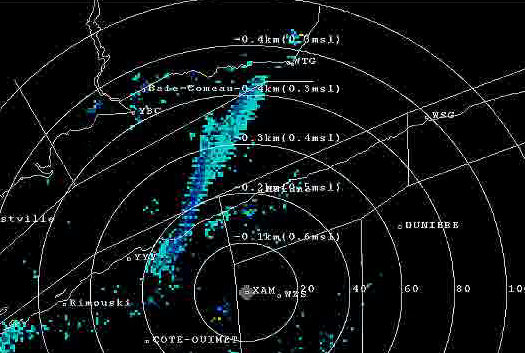 Image du radar de l'est du Québec. On voit en bleu les échos qui viennent d'une bourrasque de neige qui s'est formée sur les eaux ouvertes du fleuve Saint-Laurent alors que de l'air arctique passait juste au-dessus. Source: archives personnelles Pierre_cb Catégorie:Météorologie Catégorie:Radar météorologique